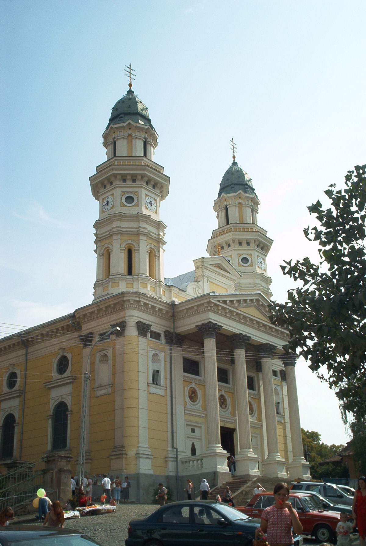 Cathédrale gréco-catholique d'Oujgorog/Ungvár